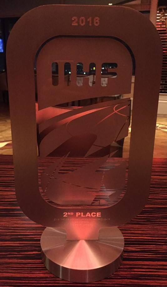 თასი რომელიც 2016 წელს თურქეთში აიღეს.